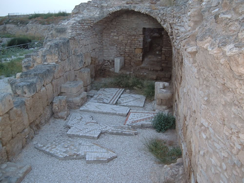 autore:Luigi Capozzi descrizione:Canne della Battaglia anno:2007